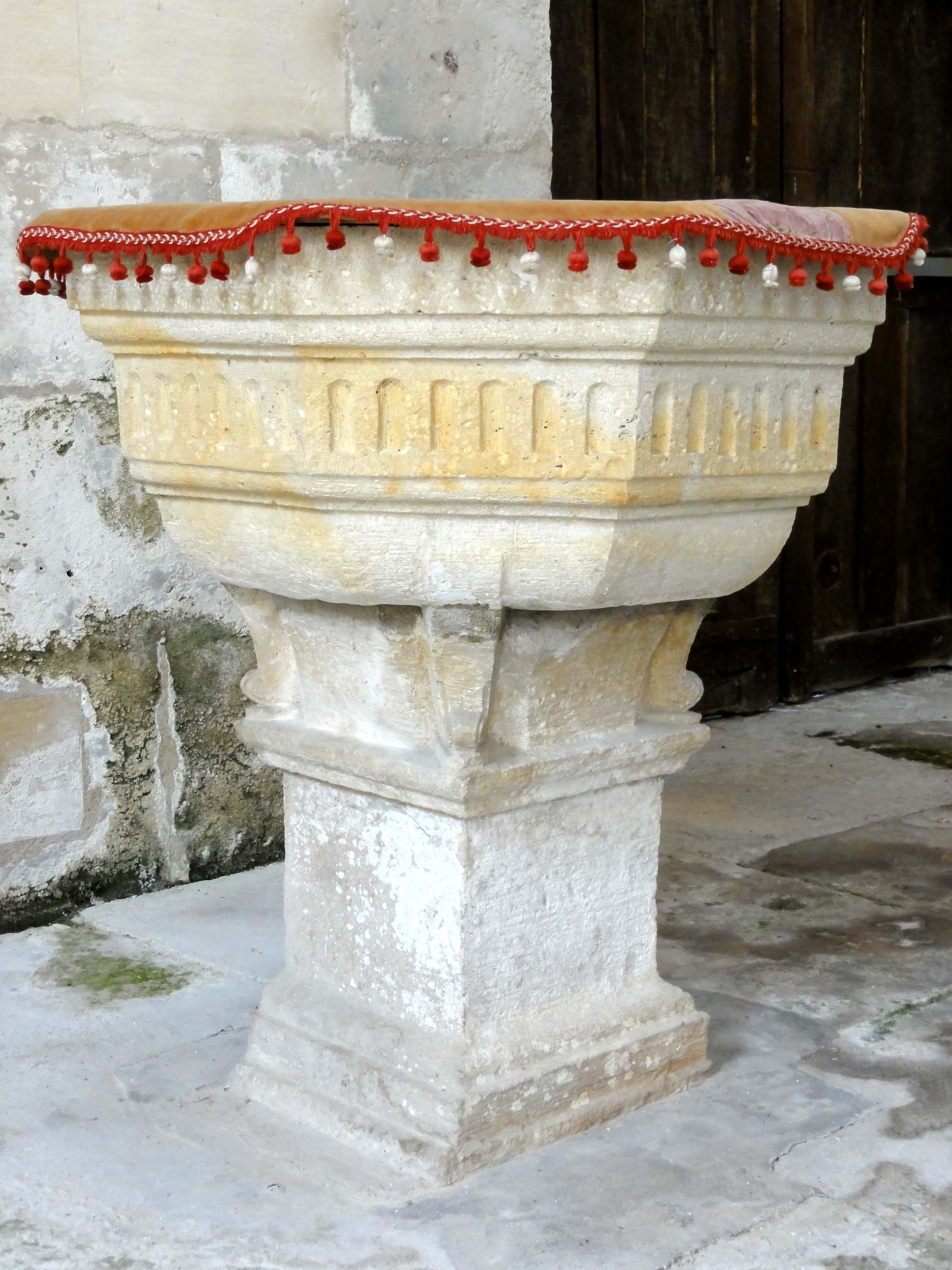 Fonts baptismaux avec cuve octogonale, fin XVIe siècle (Cf. Vasseur et Waro 1991, p. 263-264).